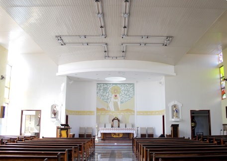 Interior da paróquia Santo Antônio, Mogi Guaçu/SP - Brasil